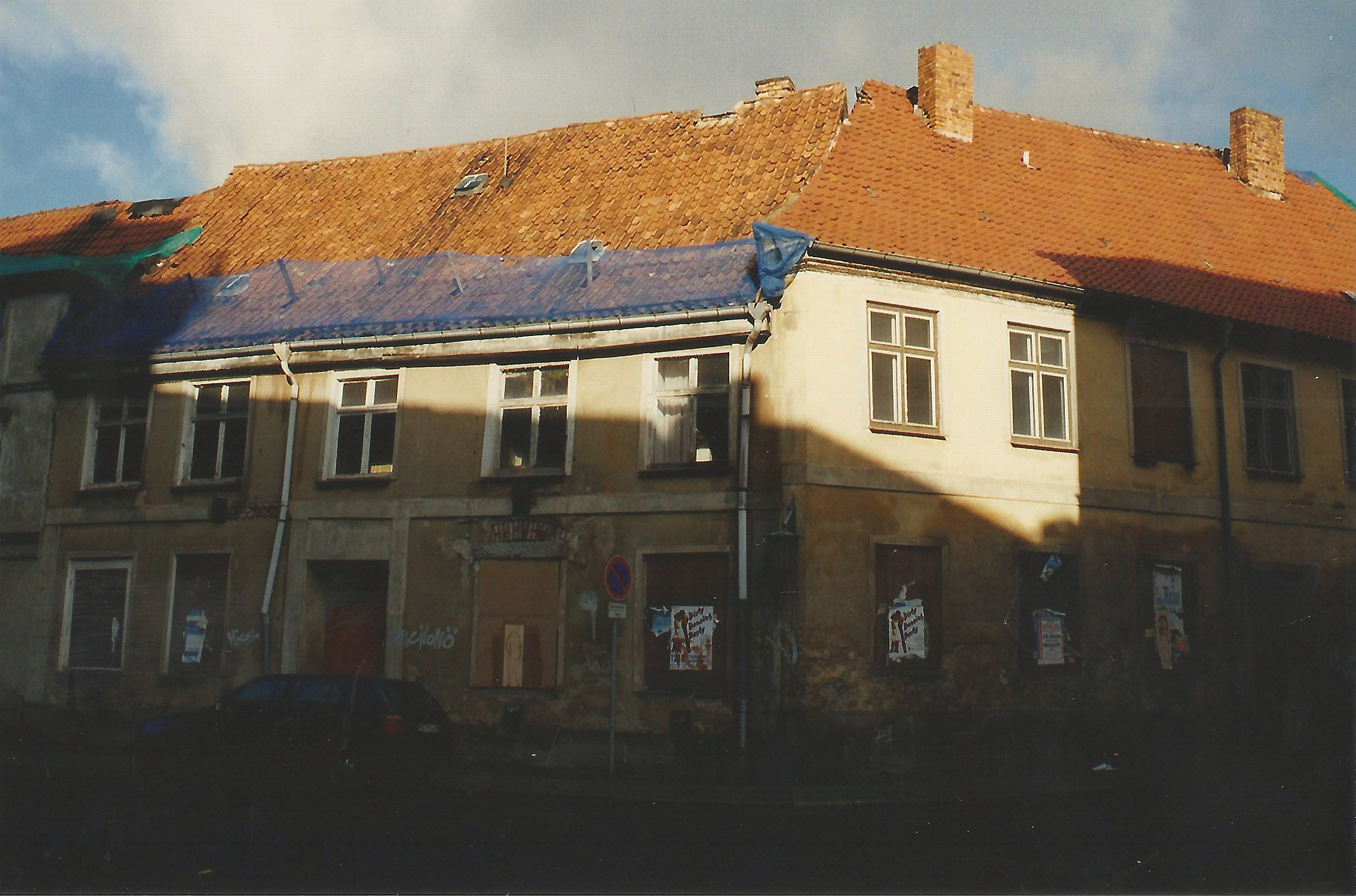 Das als Papierabzug vorliegende Foto habe ich am 5. August 2012 eingescannt und etwas bearbeitet. Das ungefähre Aufnahmedatum steht im Dateinamen; dies ist oft nur der Monat und das Jahr der Filmentwicklung.